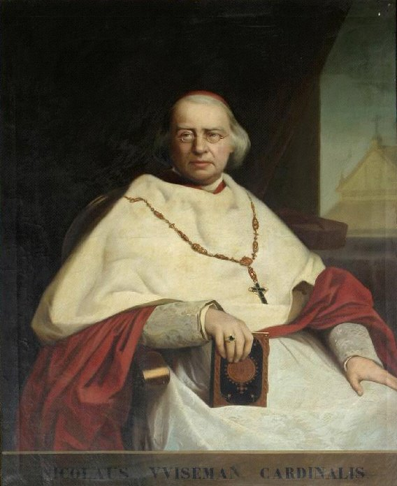 El cardenal Nicholas Wiseman (1802-1865), que luce una capa roja con muceta blanca, aparece retratado ante unos cortinajes y hay una ventana a la derecha. Porta sobre su pecho una cadena con una cruz y sostiene un libro con su mano derecha.